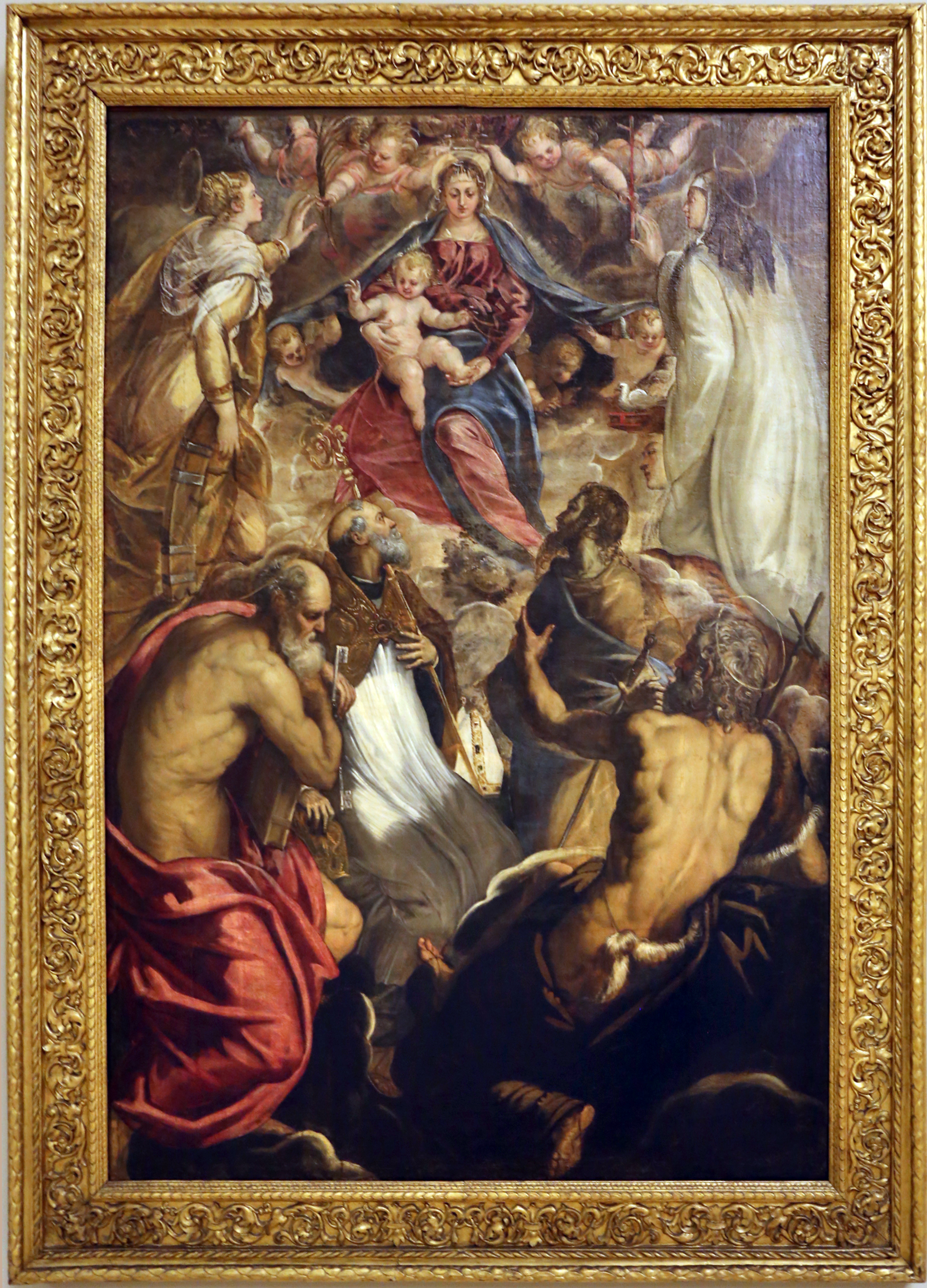 Palazzo dei Musei (Modena) This is a photo of a monument which is part of cultural heritage of Italy.